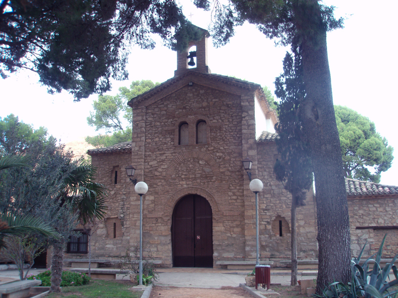 Ermita de Santa Cruz (Tudela), en 2010